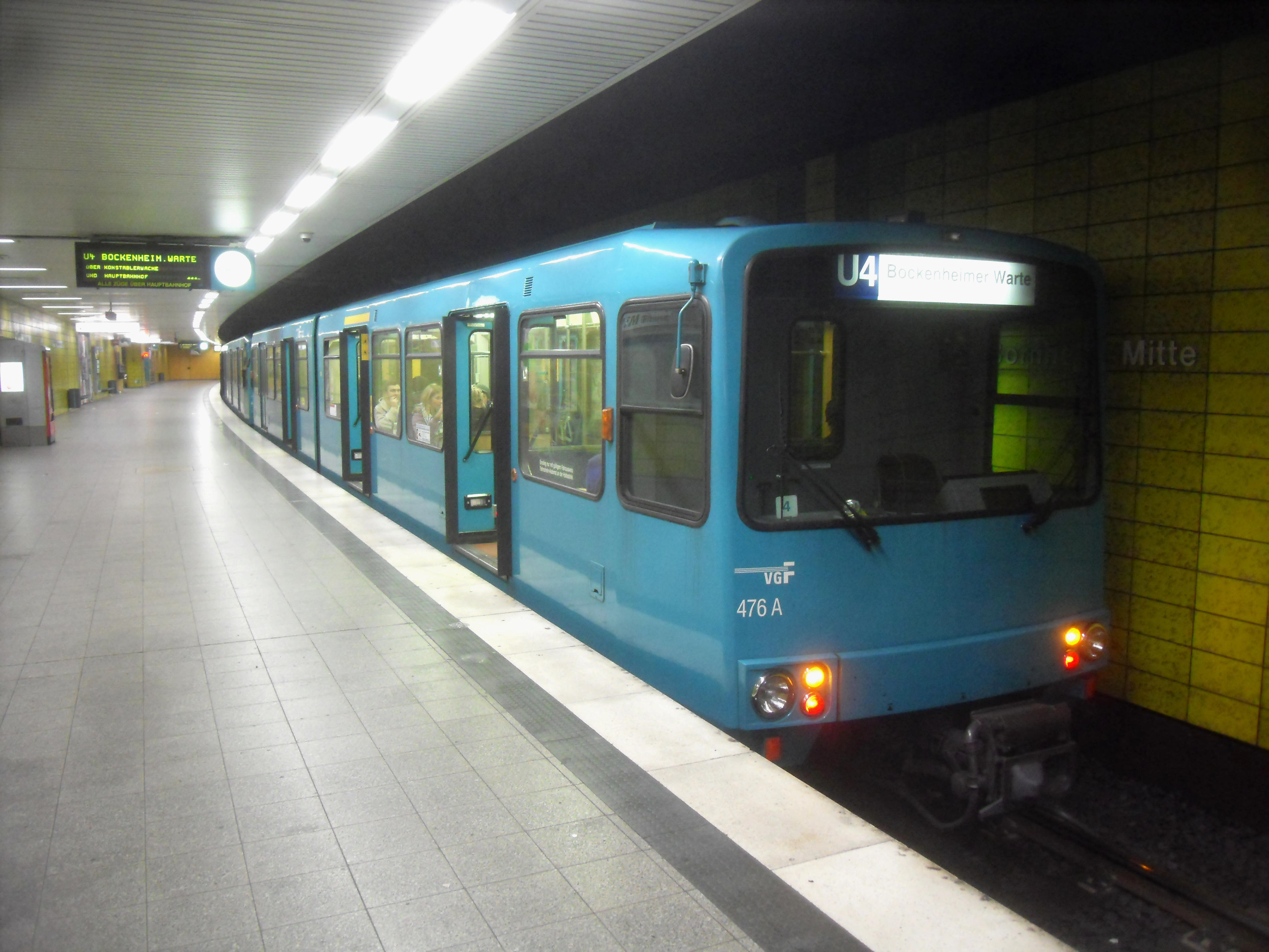 U 3-Triebwagen der U-Bahn Frankfurt in der D-Ebene des U-Bahnhofes Bornheim-Mitte auf der Linie U 4 auf dem Weg nach Bockenheimer Warte in Hessen (Deutschland)